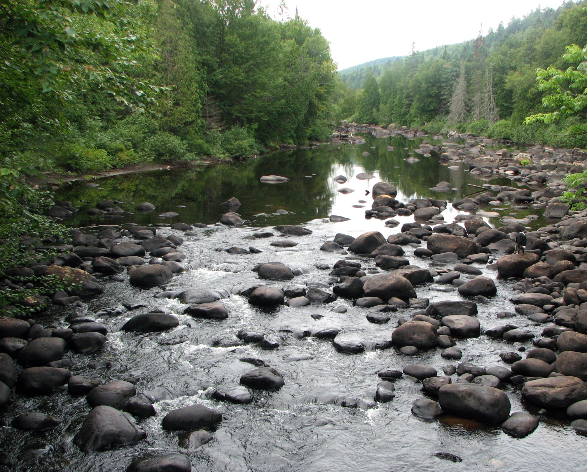 Rivière Shawinigan avant le Lac Mongrain (OUEST)